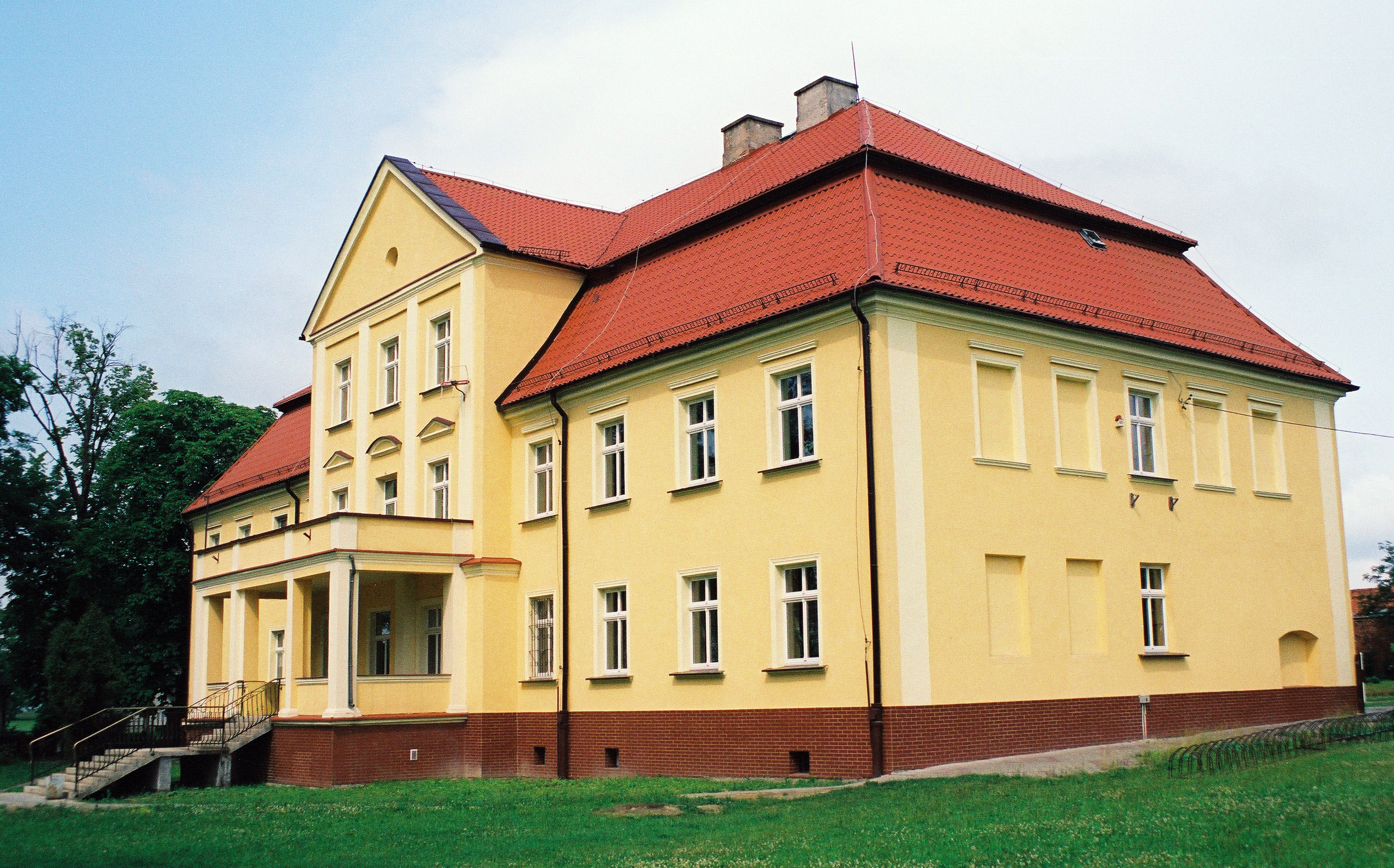 Kochanowice, ul. Szkolna 1 - pałac, pocz. XIX w., obecnie szkoła